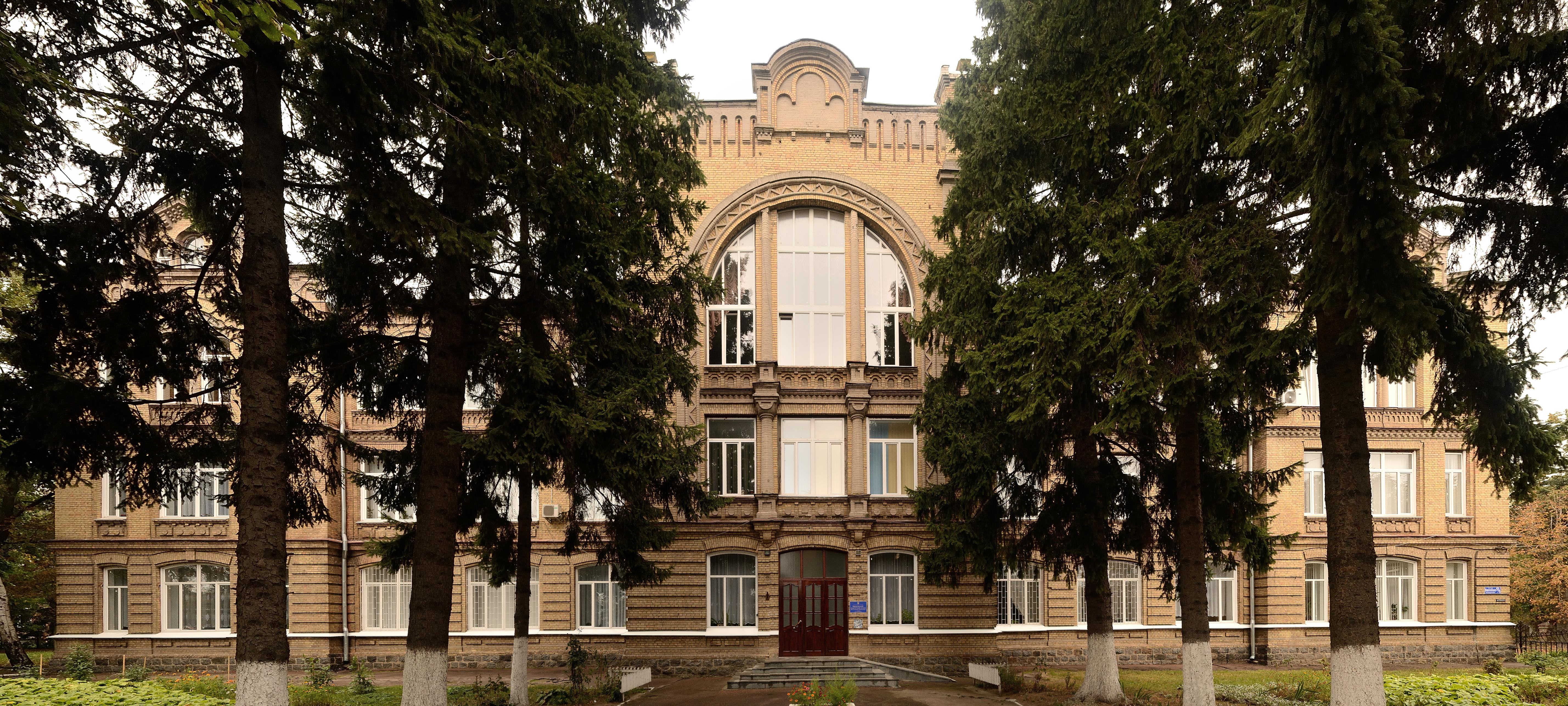 Колишнє комерційне училище, Бердичів, вул. Європейська, 53/1 (колишня вул. К. Лібкнехта, 53/1)